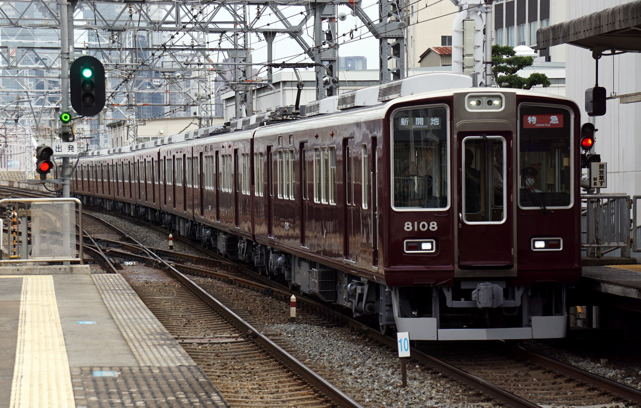 リニューアルされた8000系8008F編成。十三駅にて。2020年6月29日撮影。 Sony ILCE-6000